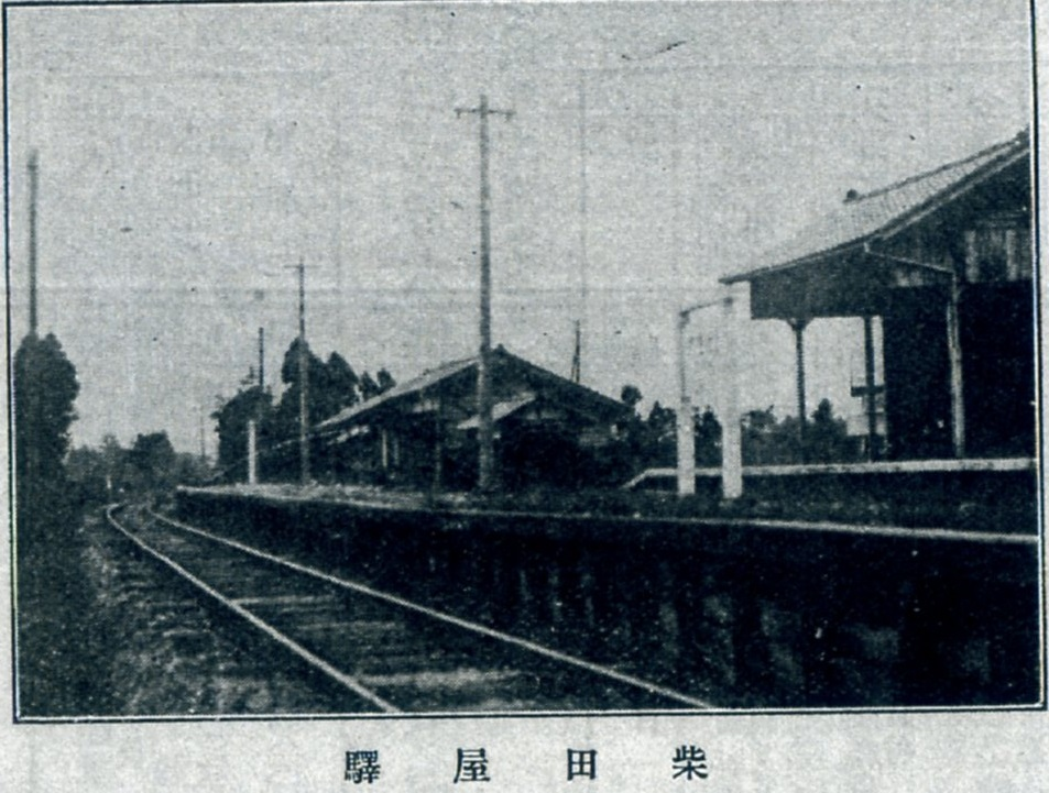 加越鉄道柴田屋駅